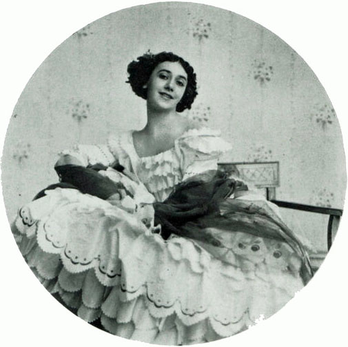 Tamara Karsavina. Тамара Карсвина